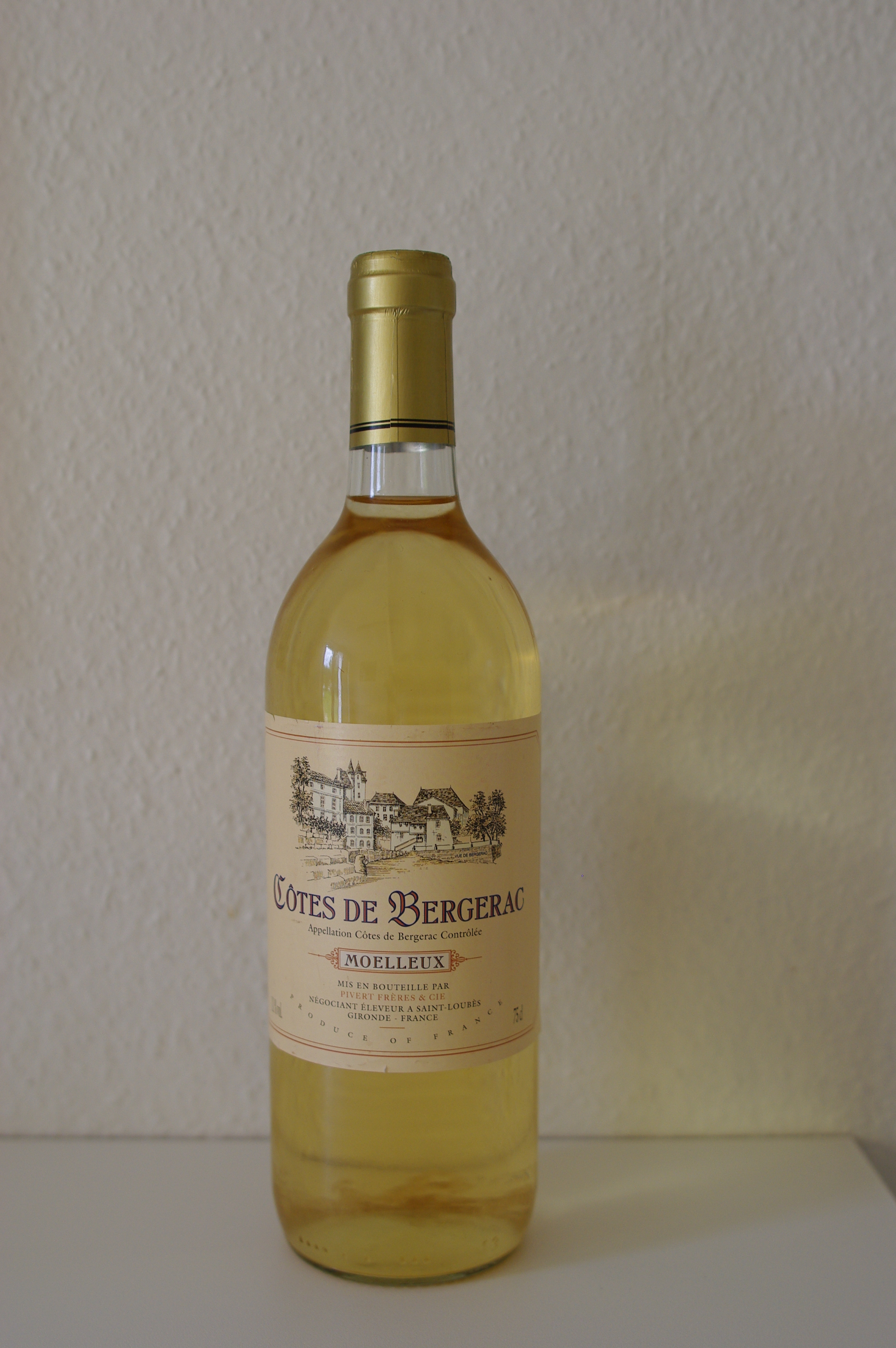 AOC côtes-de-bergerac moelleux de négociant